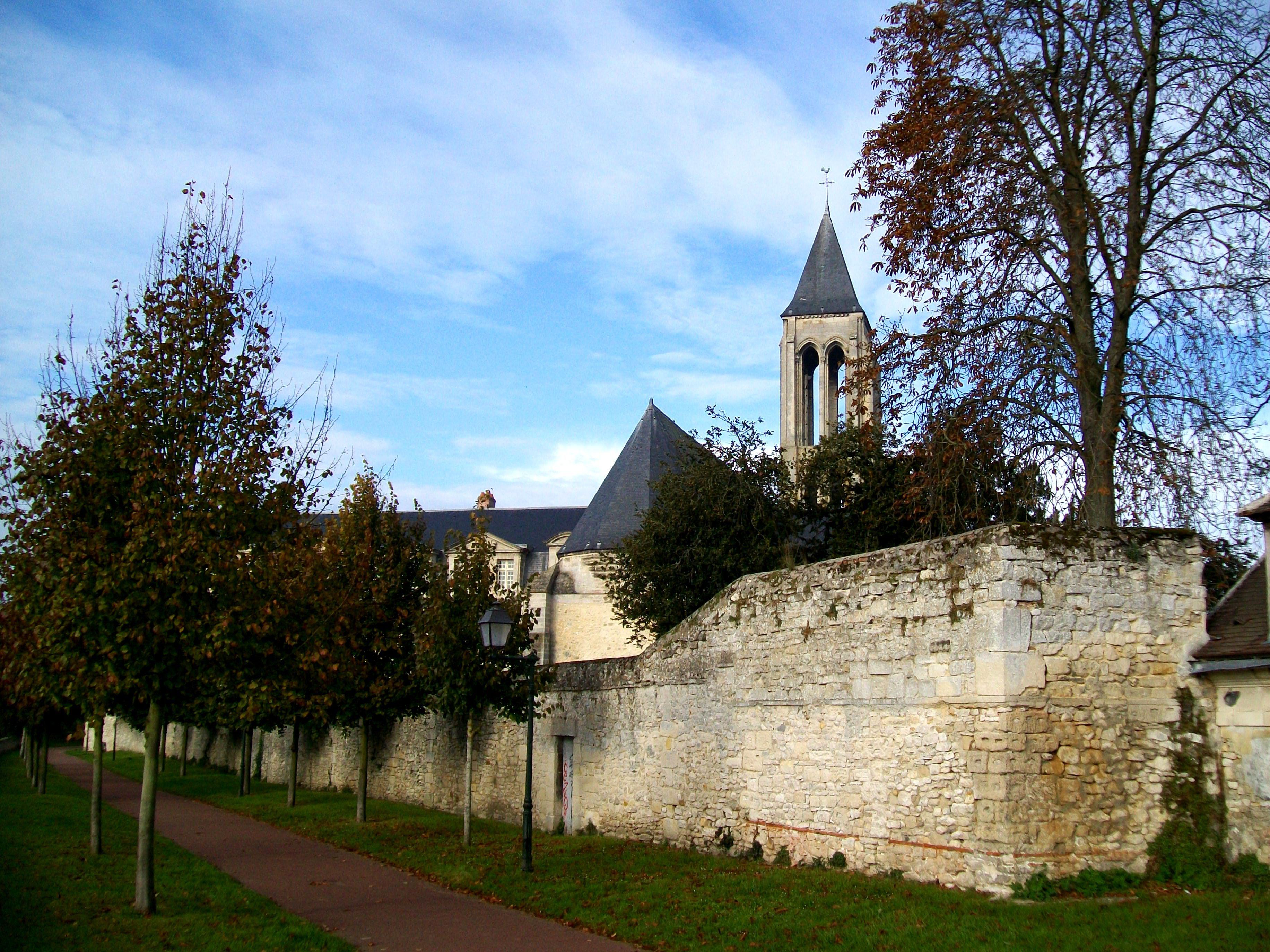 Promenade sur les remparts du Moyen-Âge, vue sur ancienne abbaye St-Vincent et son église.